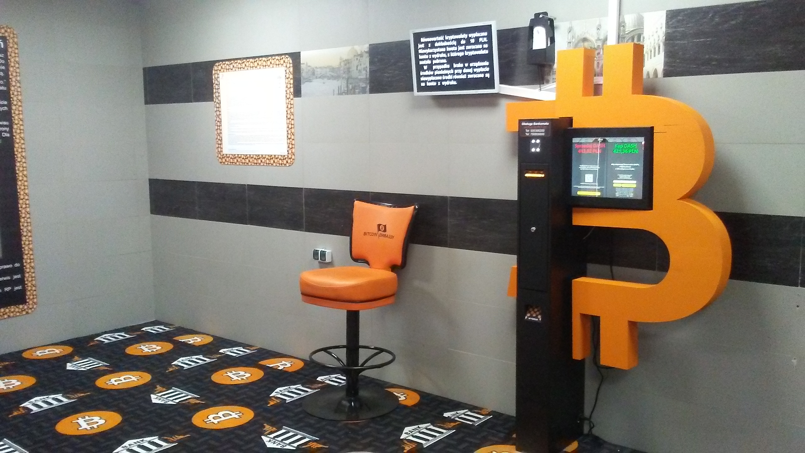 Tomaszów Mazowiecki w województwie łódzkim. Naziemny punkt sprzedaży kryptowaluty przy ulicy Wandy Panfil, PL, EU. CC0